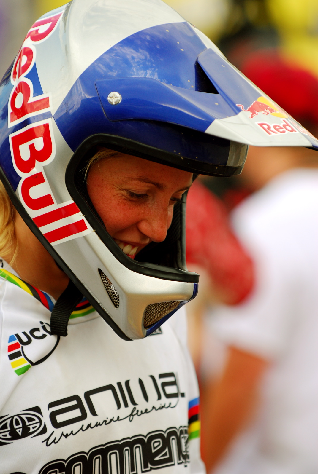 Rachel Atherton